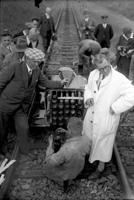 Der sensationelle Start des ersten Raketenwagens auf Eisenbahnschienen in Burgwedel bei Hannover. Der Raketenwagen auf Schienen erreichte eine Stundengeschwindigkeit von 254 km und verbesserte den Weltrecord für Fahrzeuge auf Schienen um 39 km in der Stunde. Das Anbringen der Raketen in das Raketen-Fahrzeug auf Schienen. Links Ing. Sander, der Schöpfer der Raketen-Construktion und rechts Fritz von Opel, der Erbauer und Förderer des Raketenwagens.